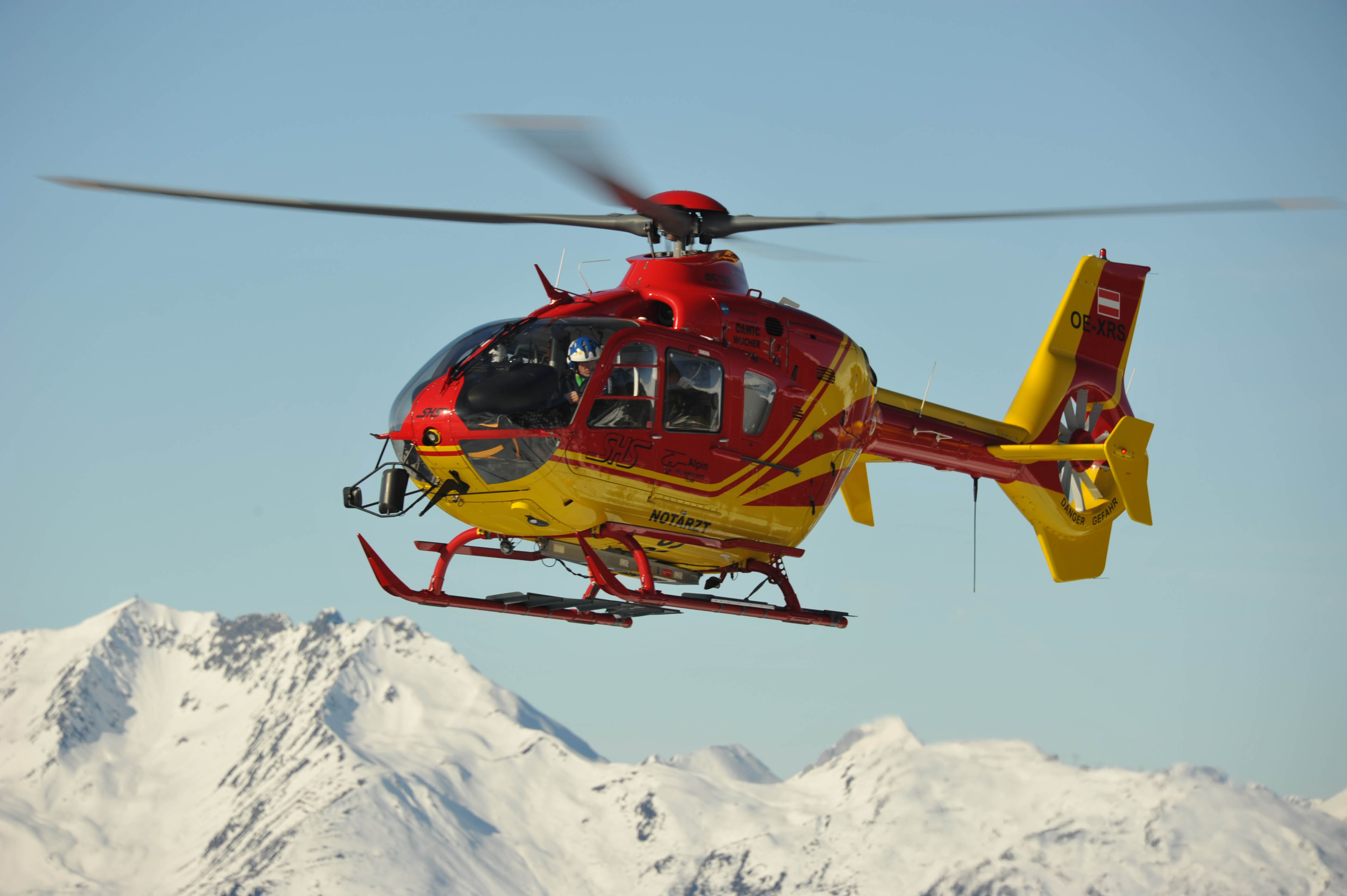 Rettungshubschrauber des österreichischen Privatanbieters SHS in Königsleiten (Bundesland Salzburg)